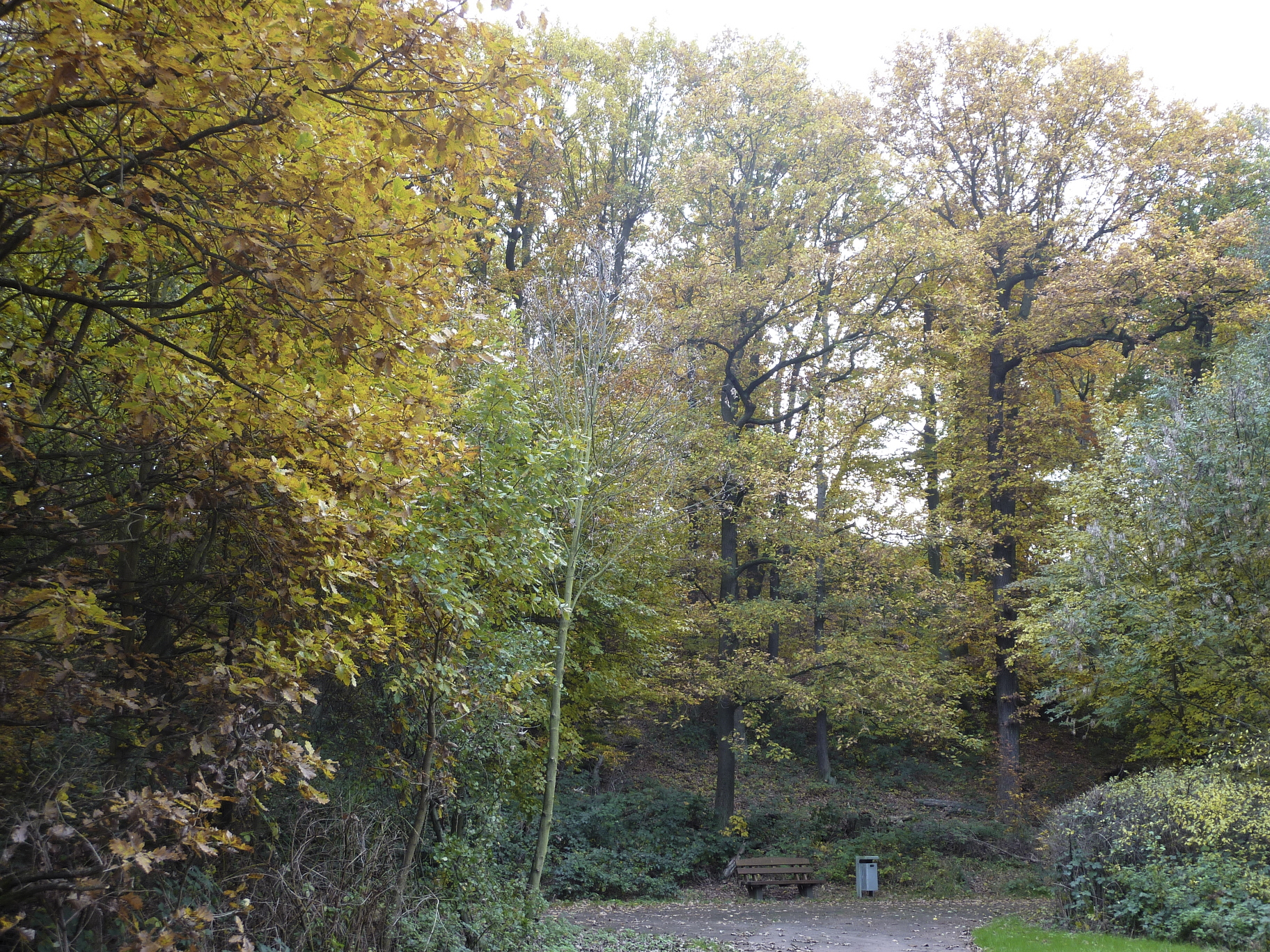 Bundesland Hessen: Die Kelsterbacher Terrasse ist eine acht Kilometer lange und bis zu 17 m hohe Geländestufe in der Stadt Kelsterbach und im Frankfurter Stadtwald. Die in west-östlicher Richtung verlaufende und nach Norden hin mäßig steil abfallende Terrasse ist eine Abbruchkante des Main-Urstromtals aus dem Erdzeitalter Pliozän. Sie beginnt im Westen am Mainufer des nördlichen Kelsterbachs, durchläuft den Schwanheimer Wald und endet südlich des Frankfurter Stadtteils Niederrad. Das Foto zeigt einen westlichen Abschnitt der Terrasse (Bildmitte) am nördlichen Rand der Gemarkung Kelsterbach, Ansicht von Norden